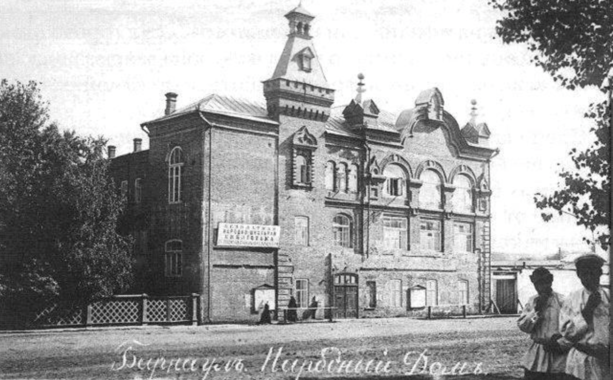 народный до в Барнауле в начале XX века